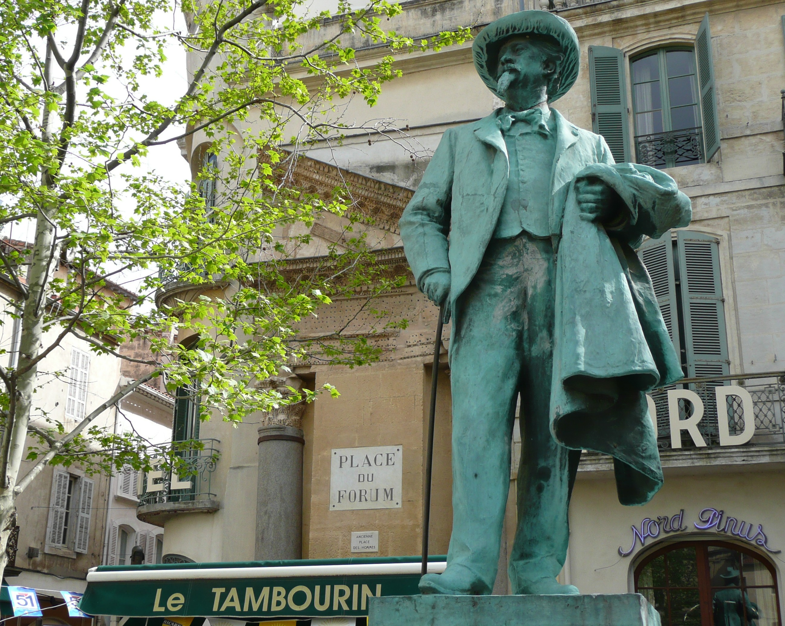 Place du Forum, encore appelée place aux Hommes, à Arles (13), monument à la mémoire de Frédéric Mistral, la statue elle-même étant due au sculpteur toulousain Théodore Rivière et le médaillon de Mireille à Férigoule, statuaire et directeur du musée d'Arles.